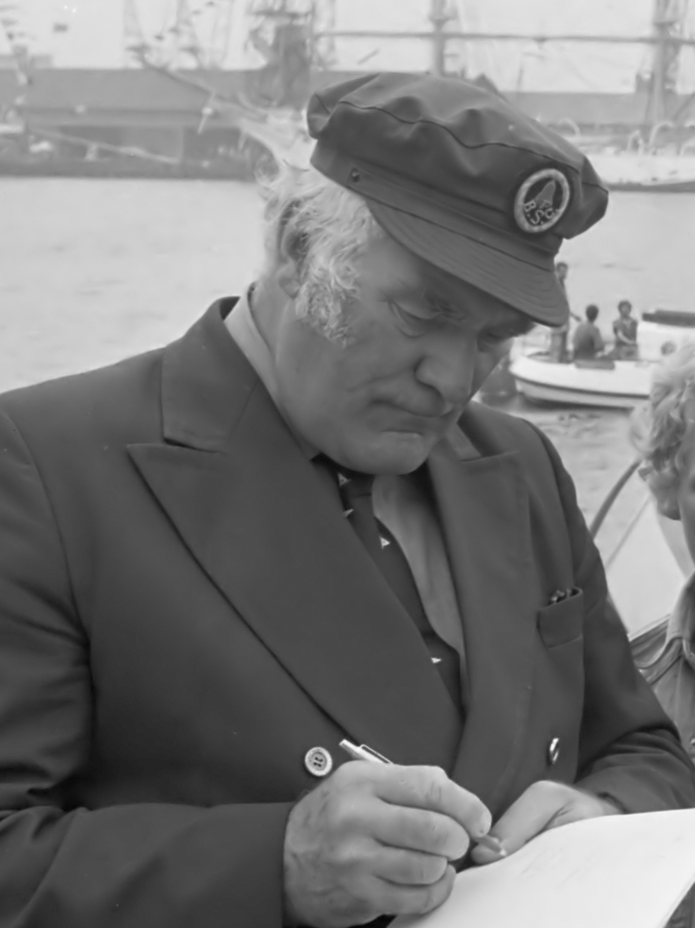 Captain Baines, een karakter in de tv-serie Onedin Line, gespeeld door acteur Howard Lang 15 augustus 1975